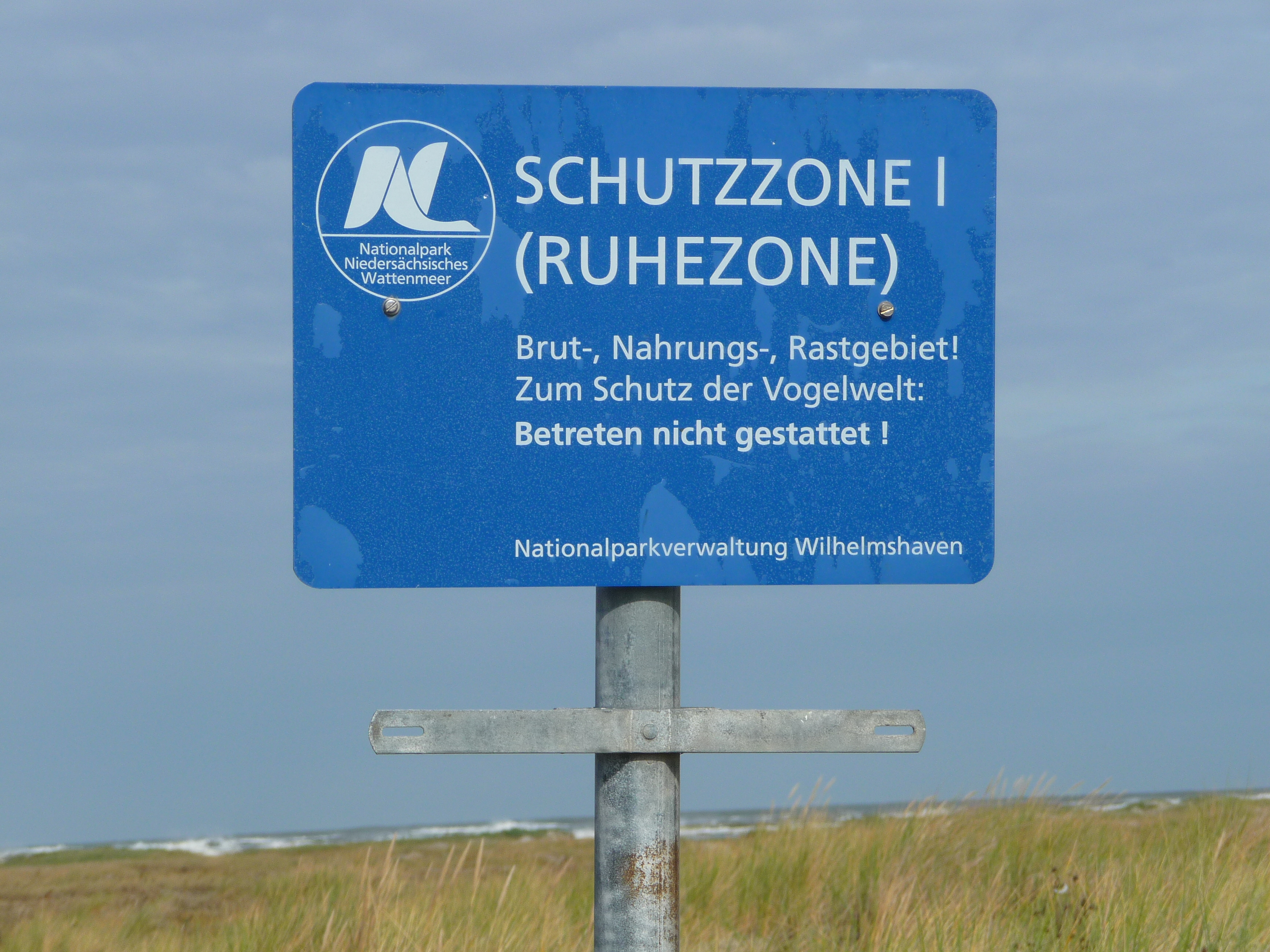 Schild der Verwaltung des Nationalparks Niedersächsisches Wattenmeer, fotografiert am Kalfamder, der Ostspitze der ostfriesischen Nordseeinsel Juist (Niedersachsen, Deutschland)